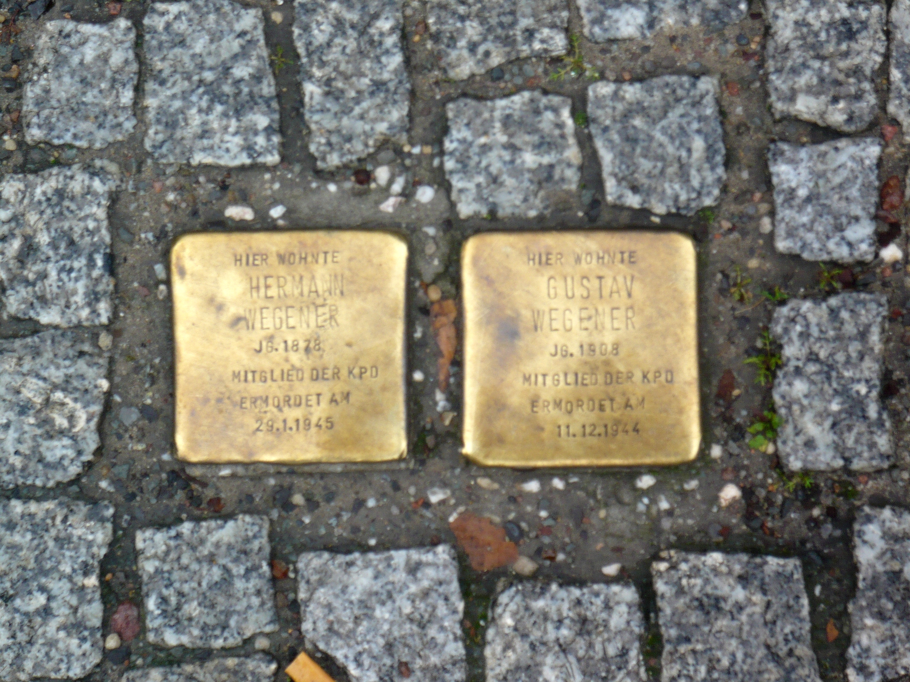 Bersarinplatz in Berlin-Friedrichshain: Stolpersteine Wegener